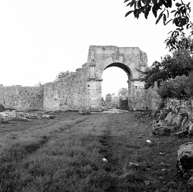 Area archeologica di Saepinum ad Altilia, frazione della moderna Sepino (CB)